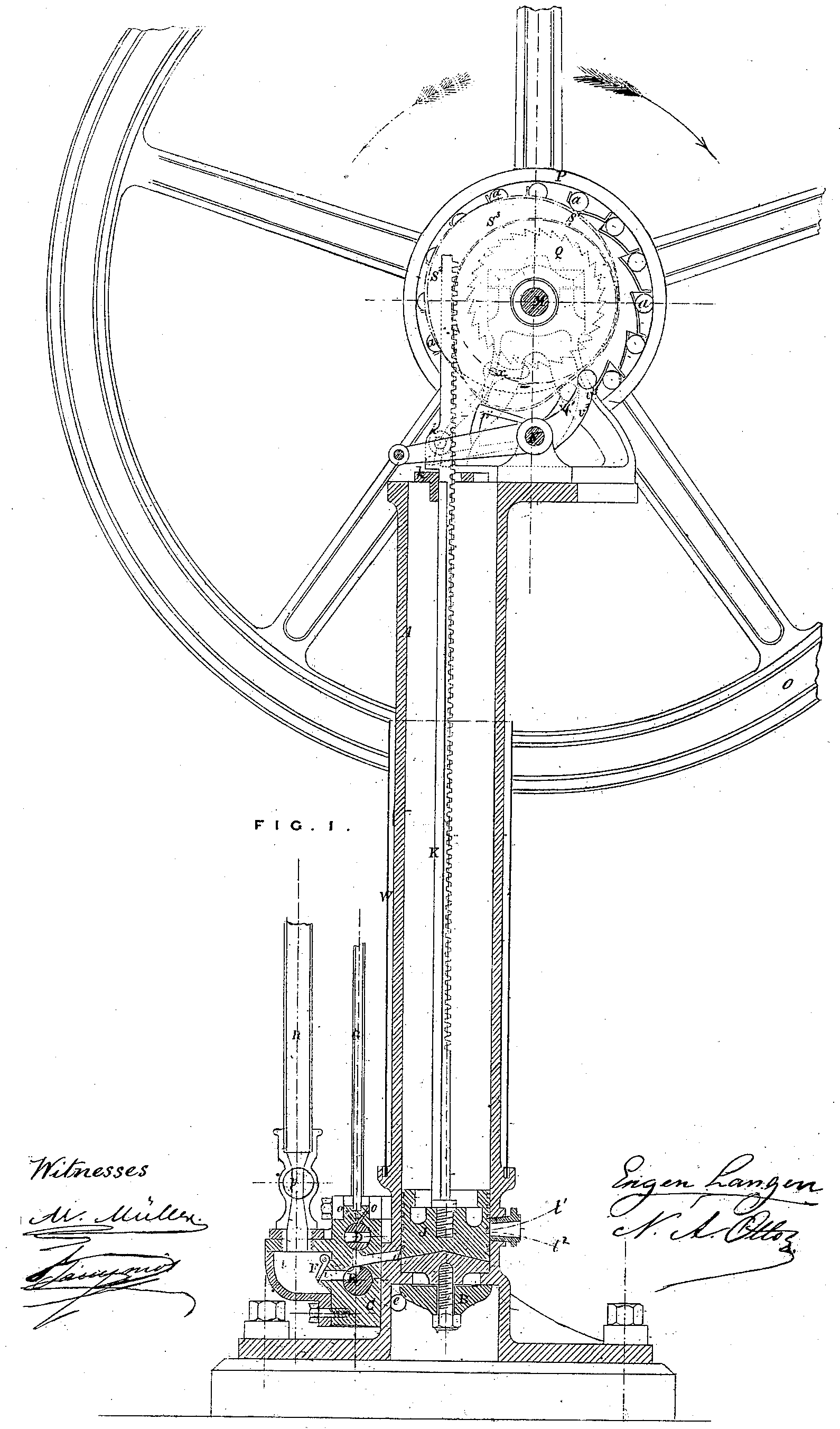 Flugkolbenmotor